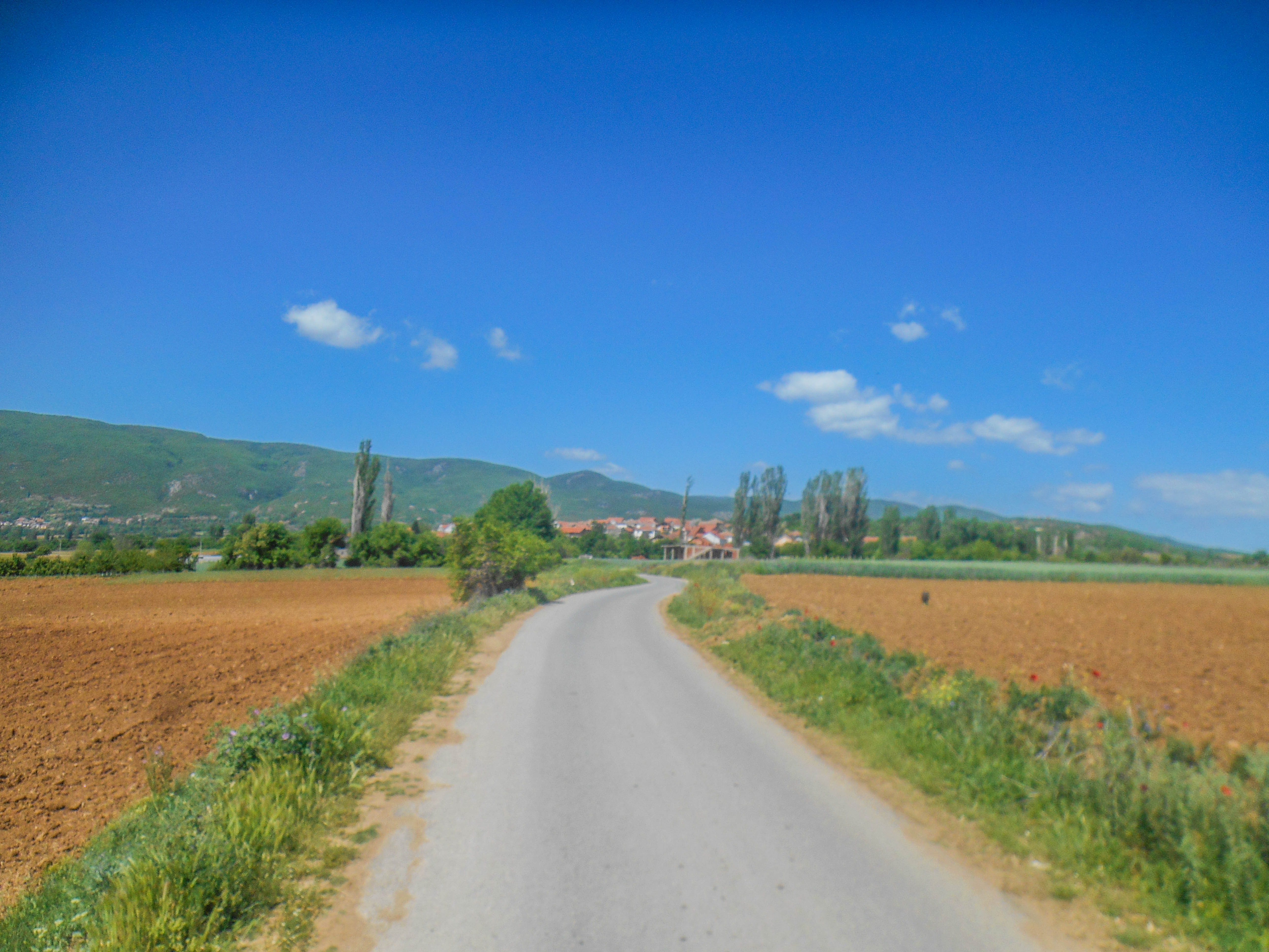 Седларци